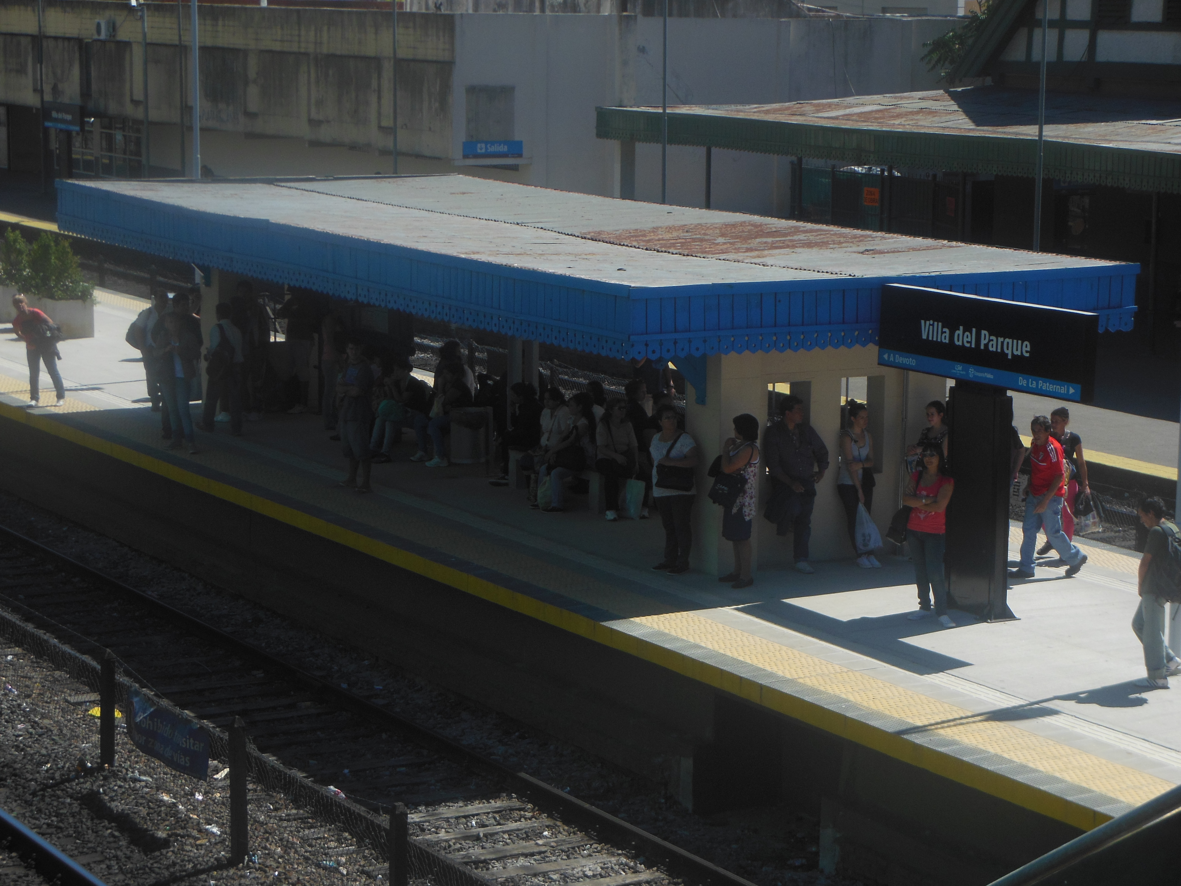 Anden central elevado de la estación Villa del Parque